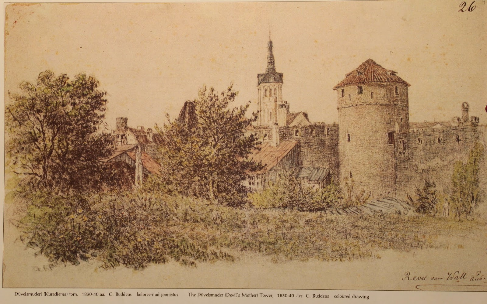 Kuradiema torn, 1840[1]